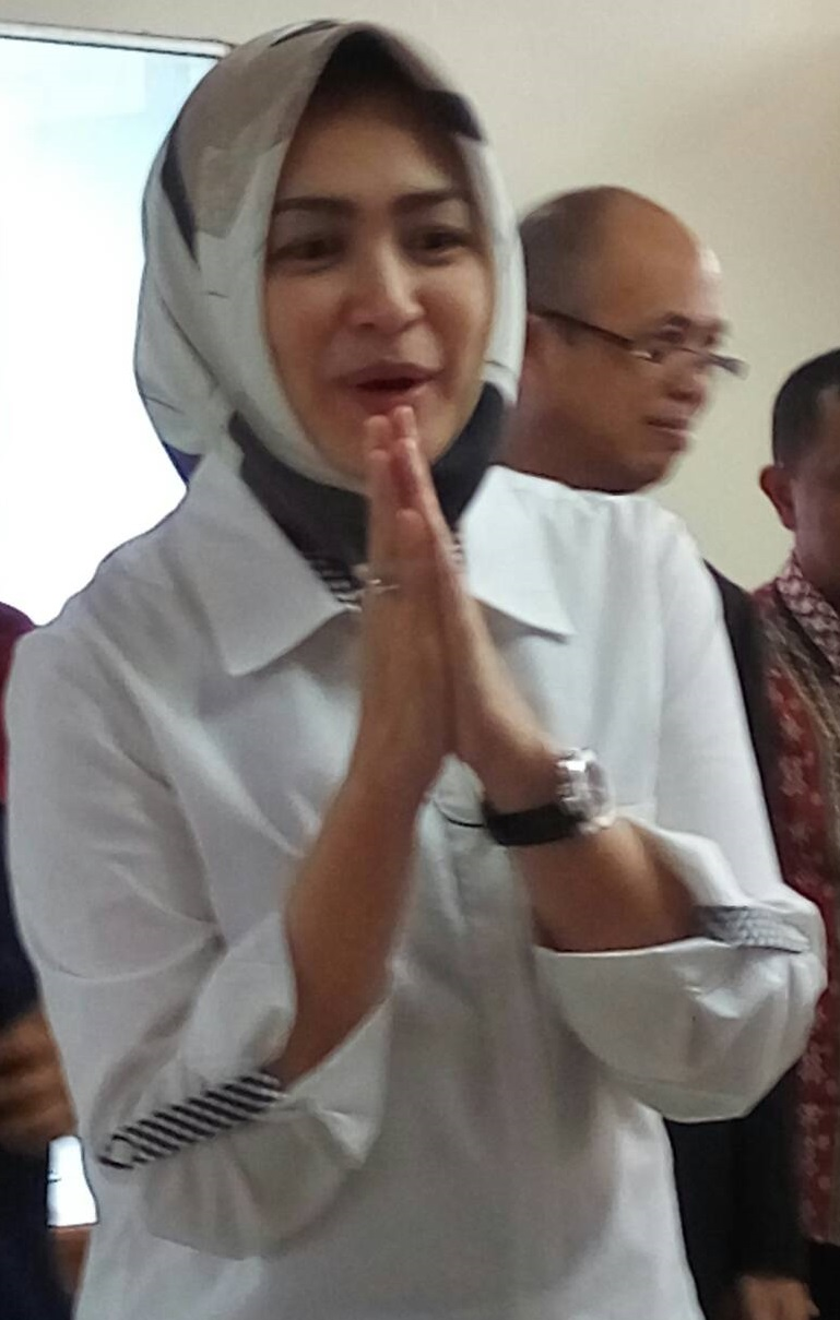 Wali Kota Tangerang Selatan, Hj. Airin Rachmi Diany di kampus FISIP UIN Syarif Hidayatullah Jakarta saat menghadiri Diskusi Publik Hari Perempuan Internasional pada 8 Maret 2017